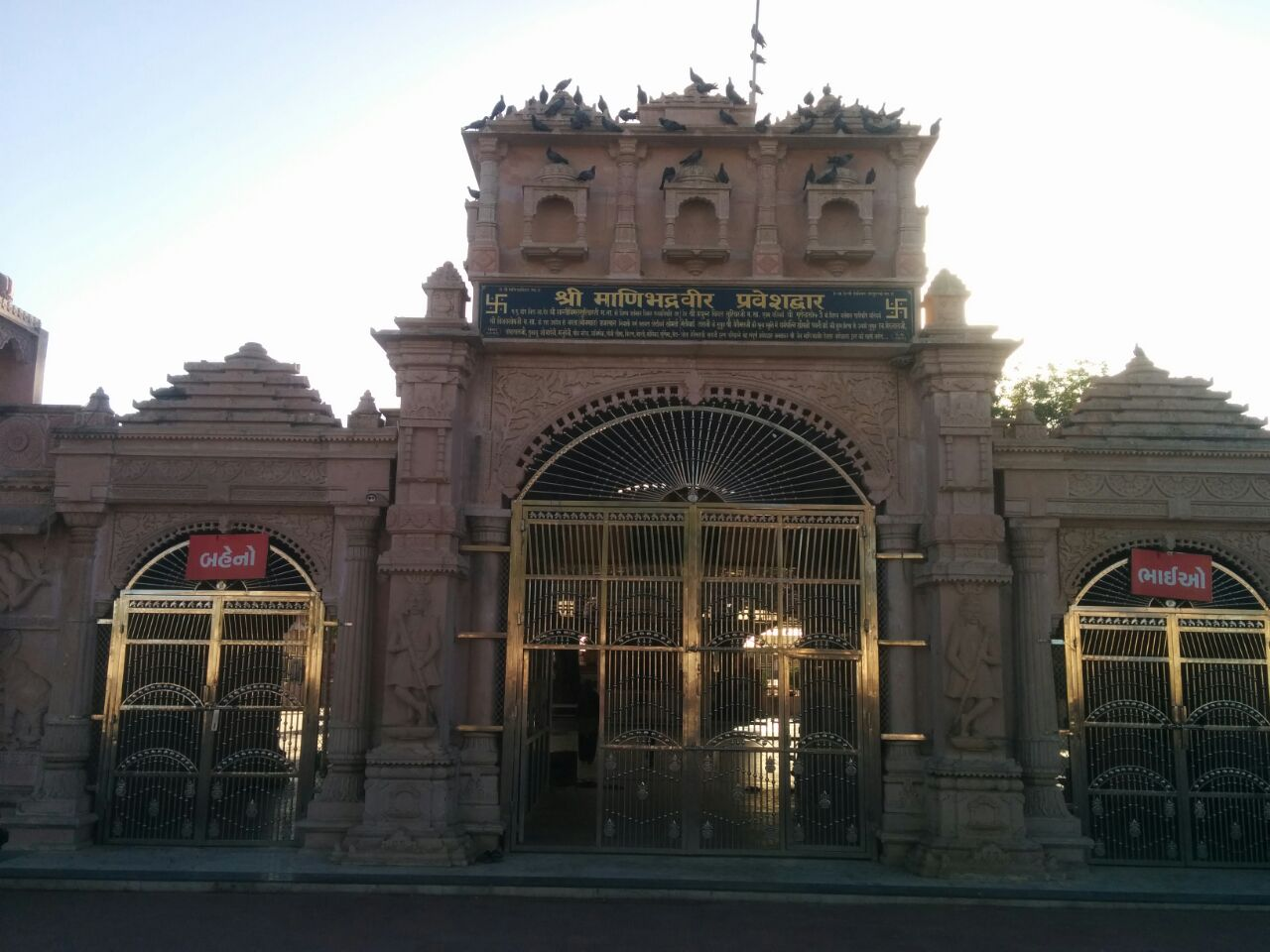 Manibhadra Vir Maharaj Temple in Magarwada, Vadgam, Gujarat.